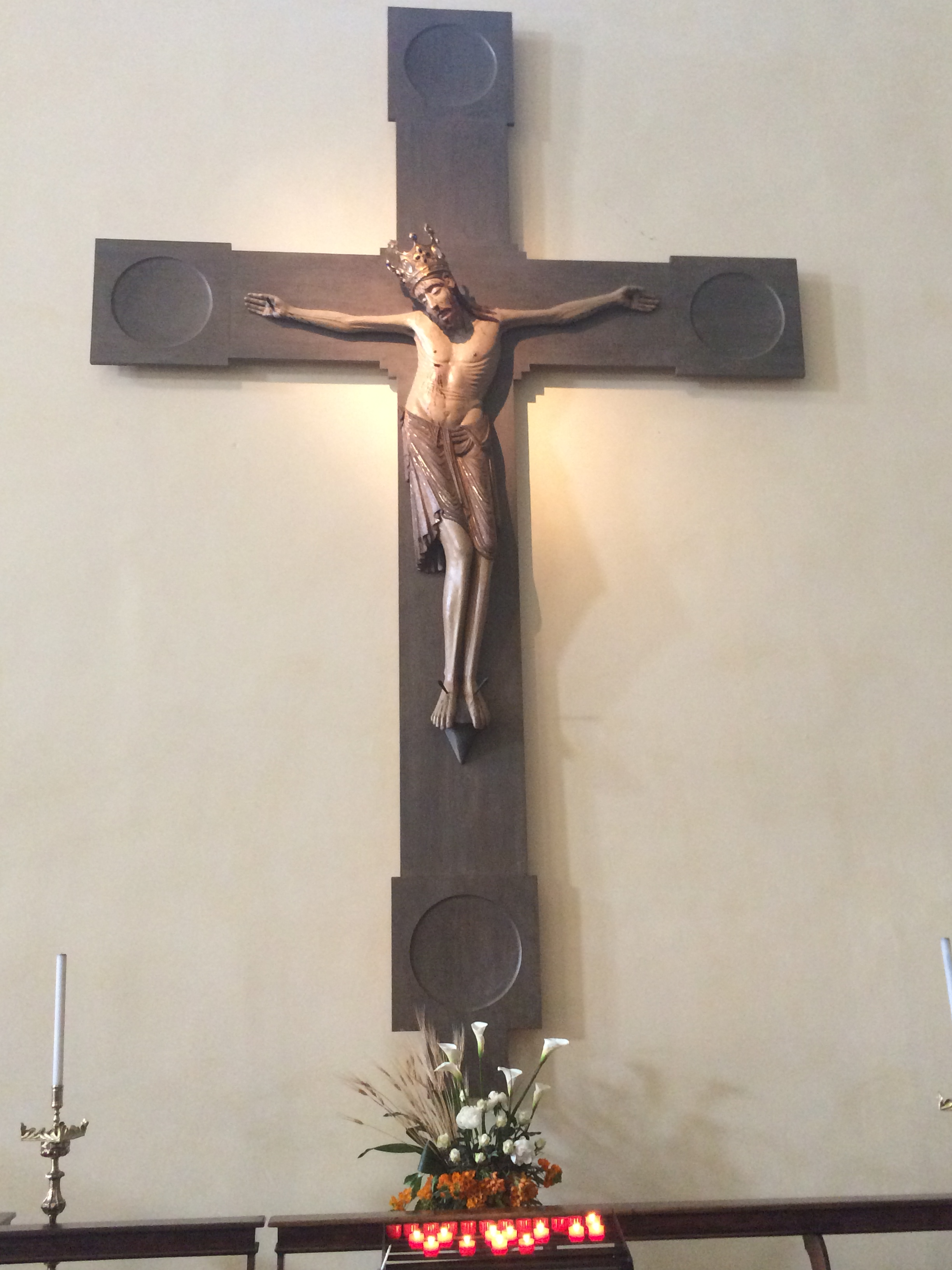 Duomo Cividale